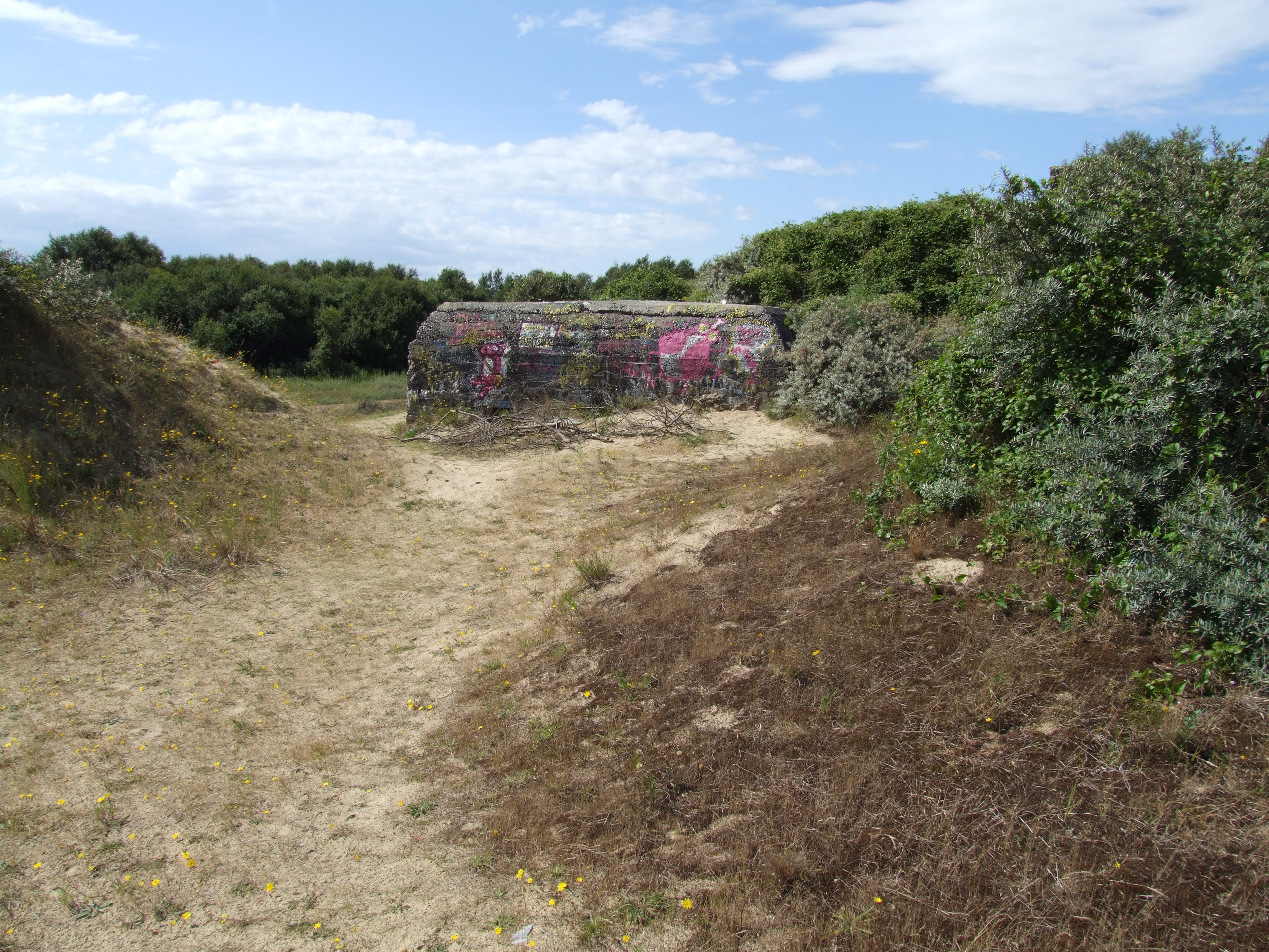 Dune du Perroquet, Bray-Dunes - Bunker im innren Bereich